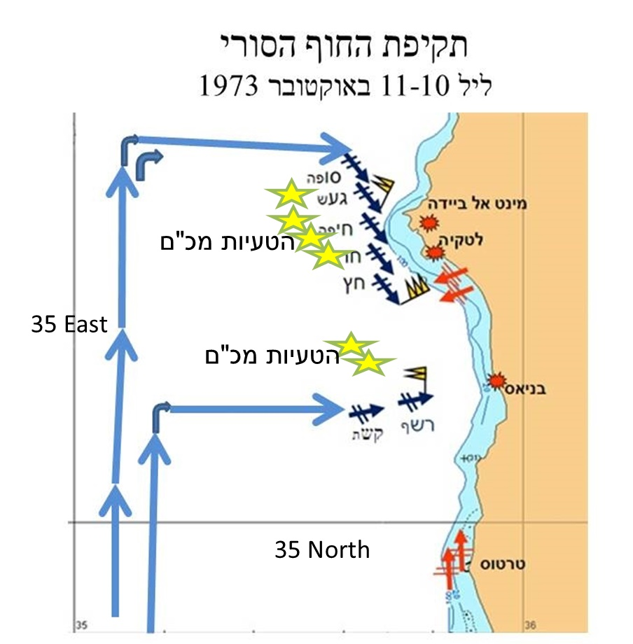 תרשים תקיפת החוף הסורי בליל 11-10 באוקטובר 1973